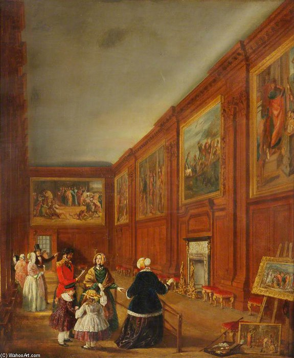 Հեմփթոն պալատ